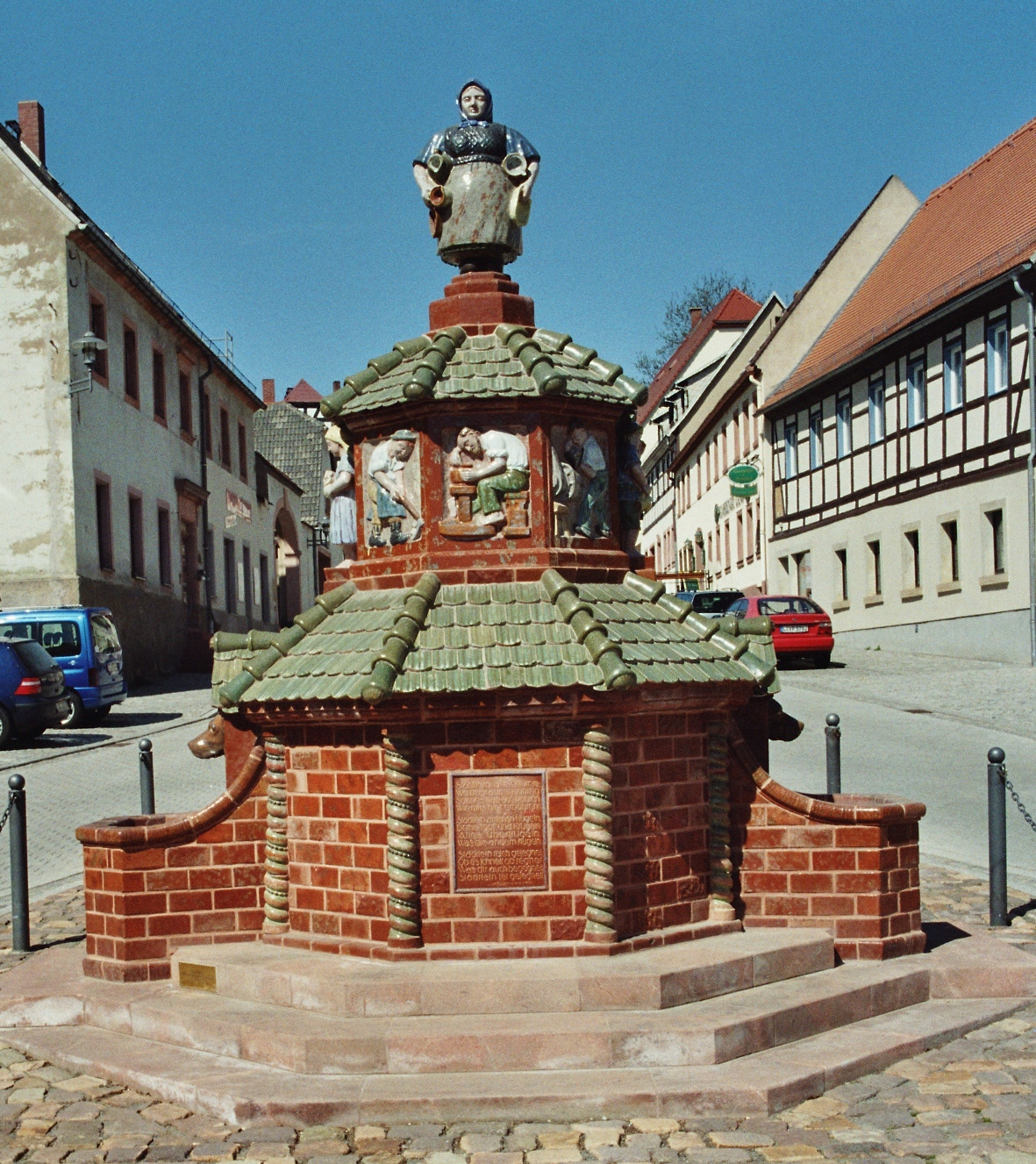 Töpferbrunnen auf dem Marktplatz in Kohren-Sahlis, Sachsen, Deutschland